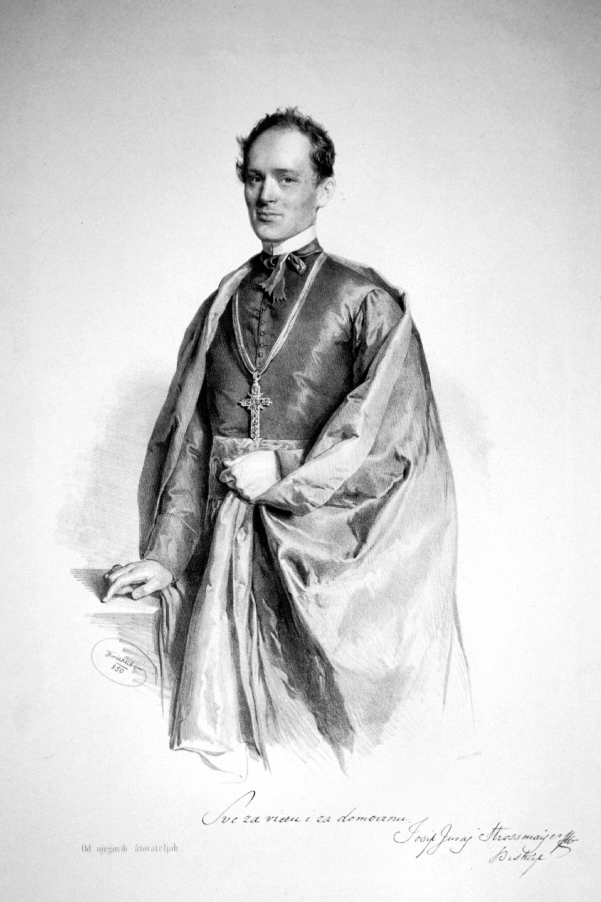 Johann Georg Srossmayer (1815-1905), kroatischer Bischof und Politiker Lithographie von Josef Kriehuber, 1850